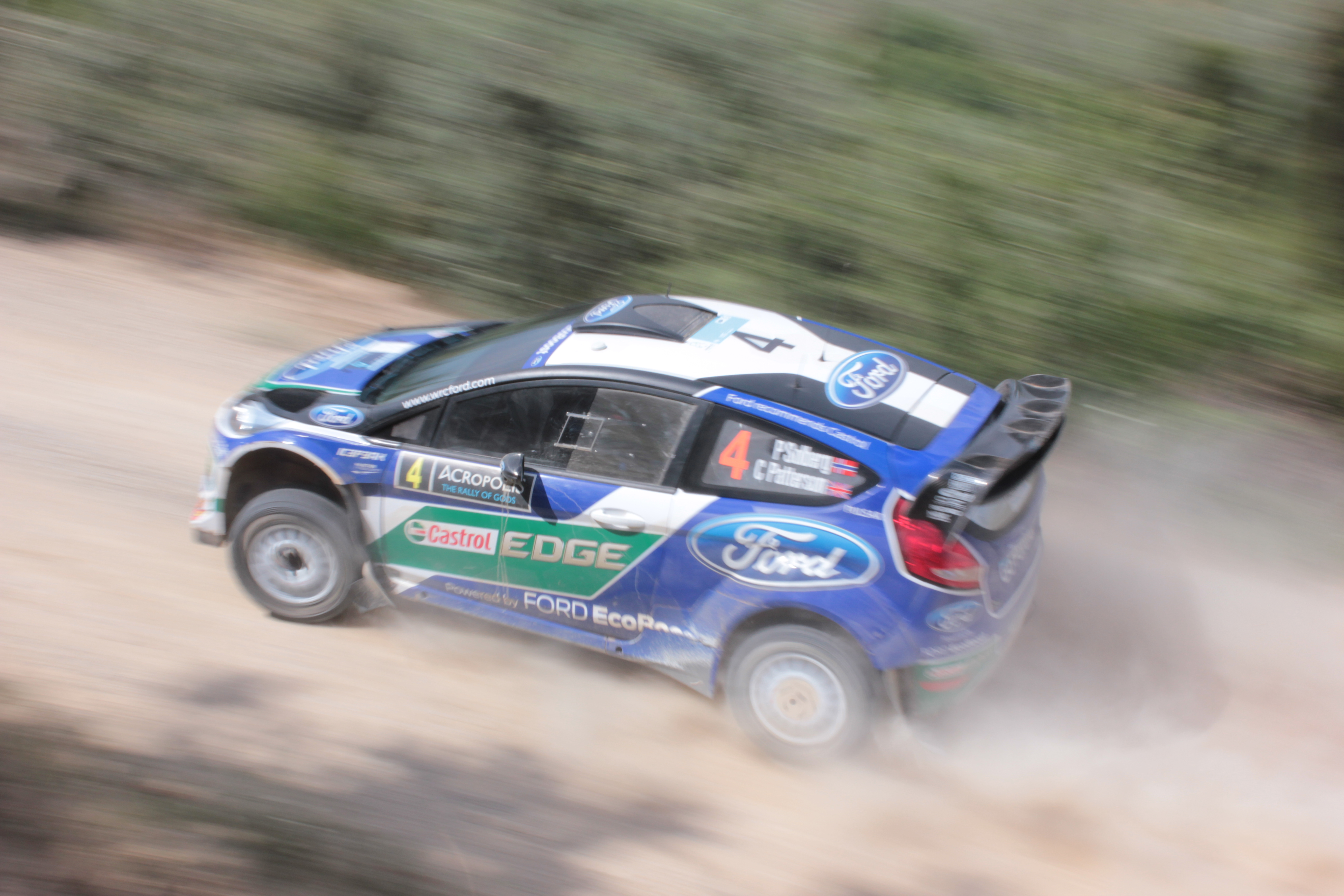 Petter Solberg podczas Rajdu Akropolis Grecji 2012